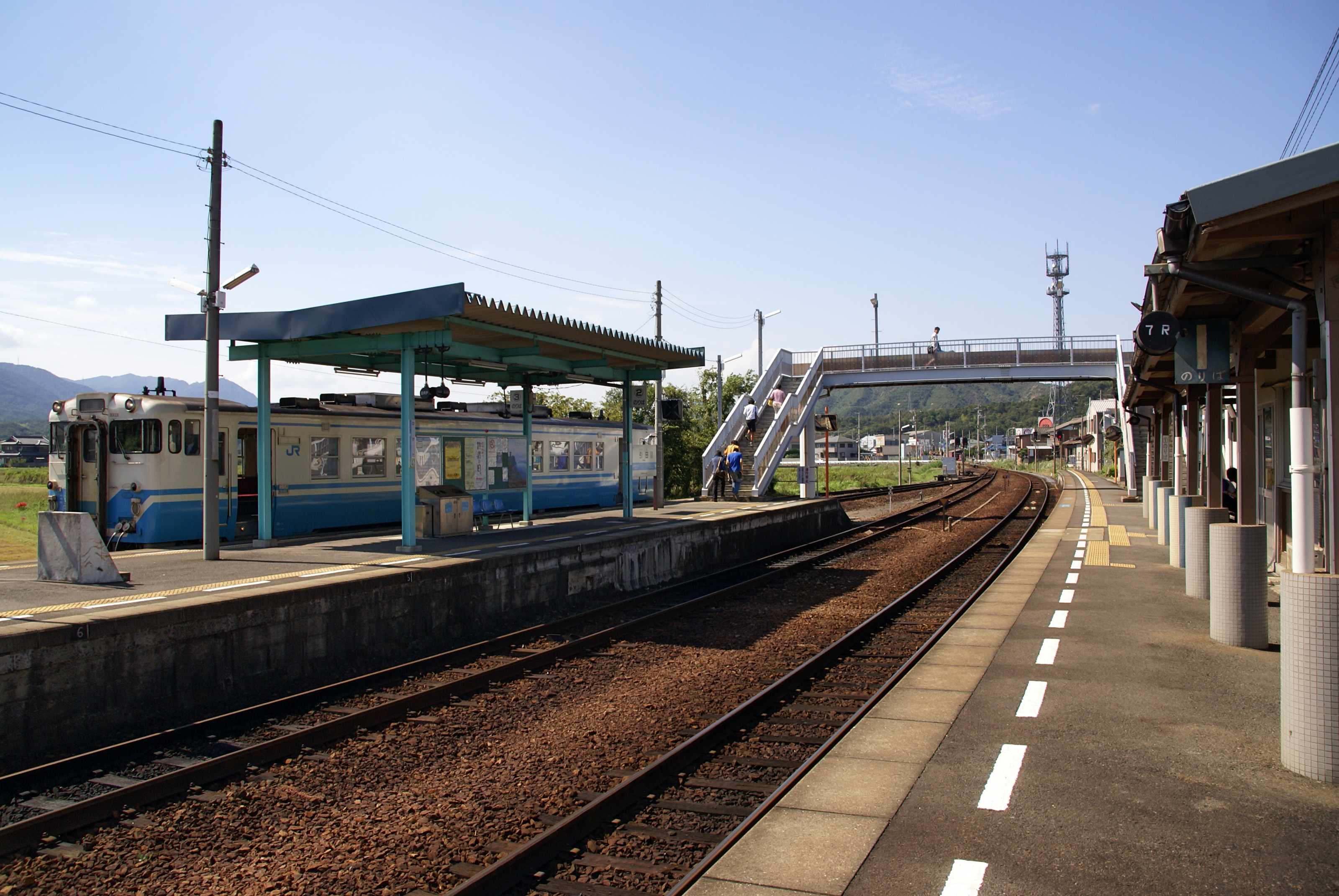 Hiketa Station in Higashikagawa, Kagawa prefecture, Japan